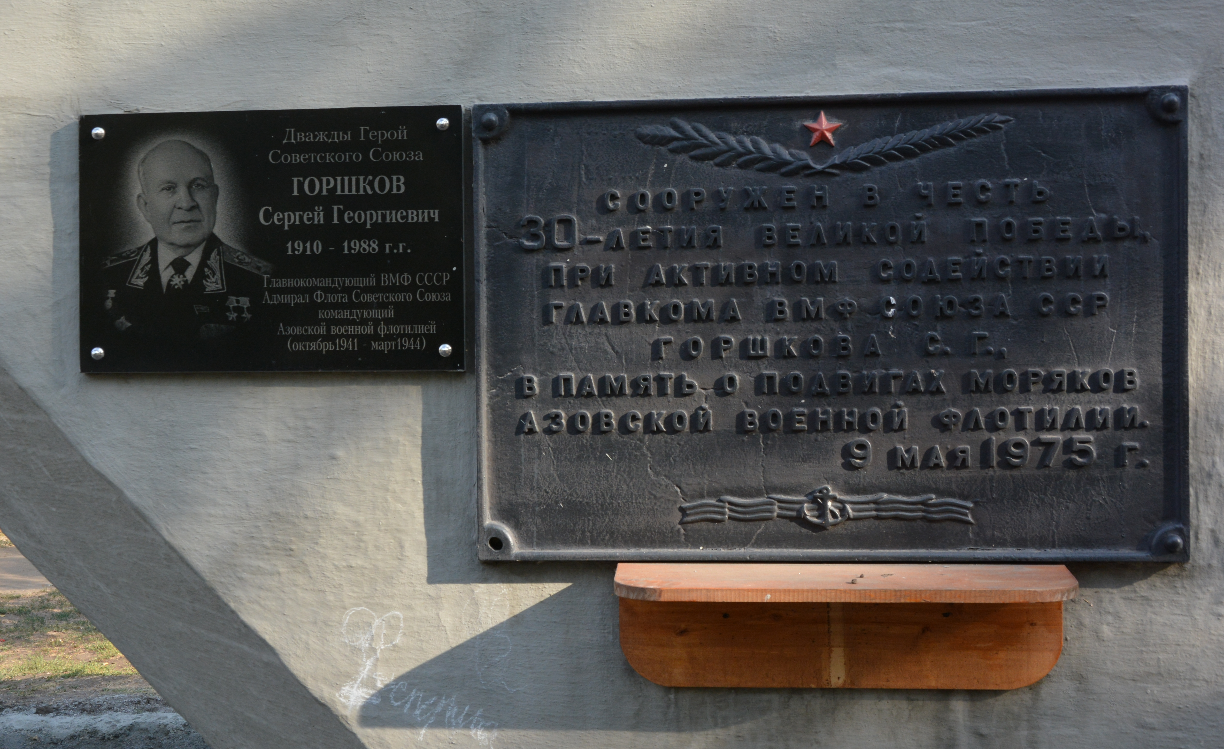 Пам`ятник на честь загиблих моряків Азовської флотилії, Бердянськ, вул. Горького, у сквері перед морським вокзалом